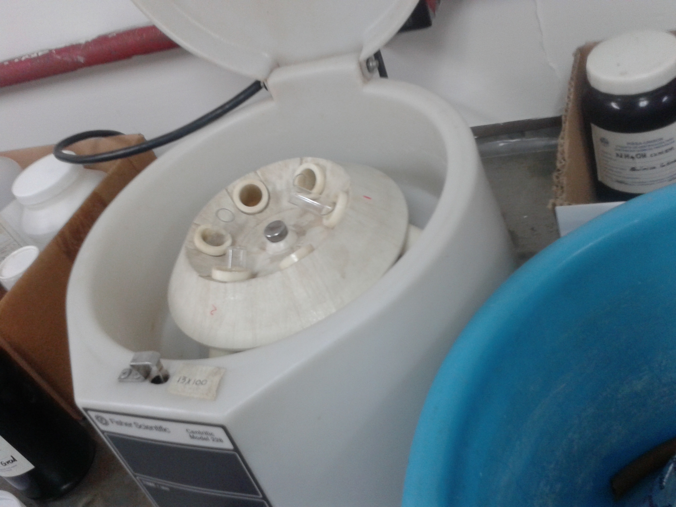 Equipo de laboratorio